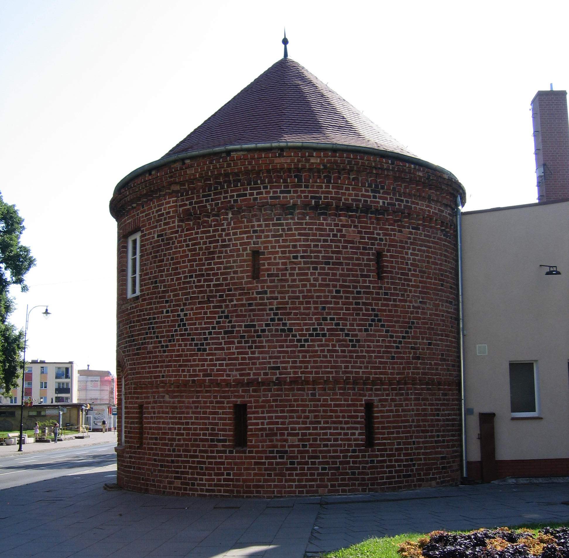 obwarowania miejskie Choszczno